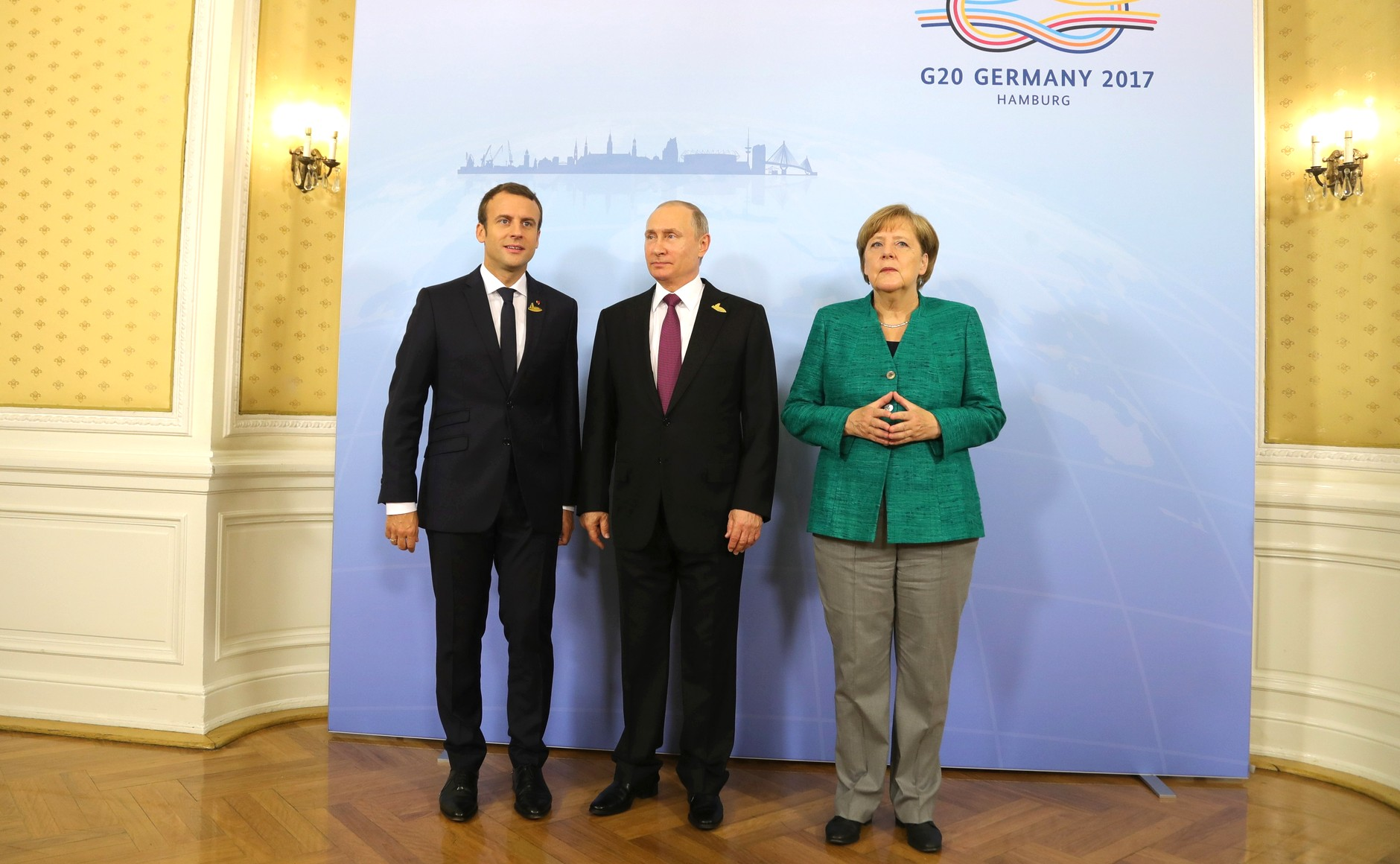 Президент России Владимир Путин с Федеральным канцлером Германии Ангелой Меркель и Президентом Франции Эммануэлем Макроном перед началом рабочего завтрака